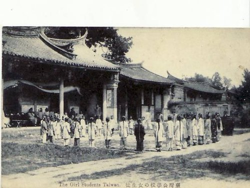 日治時期台南孔廟作為公學校